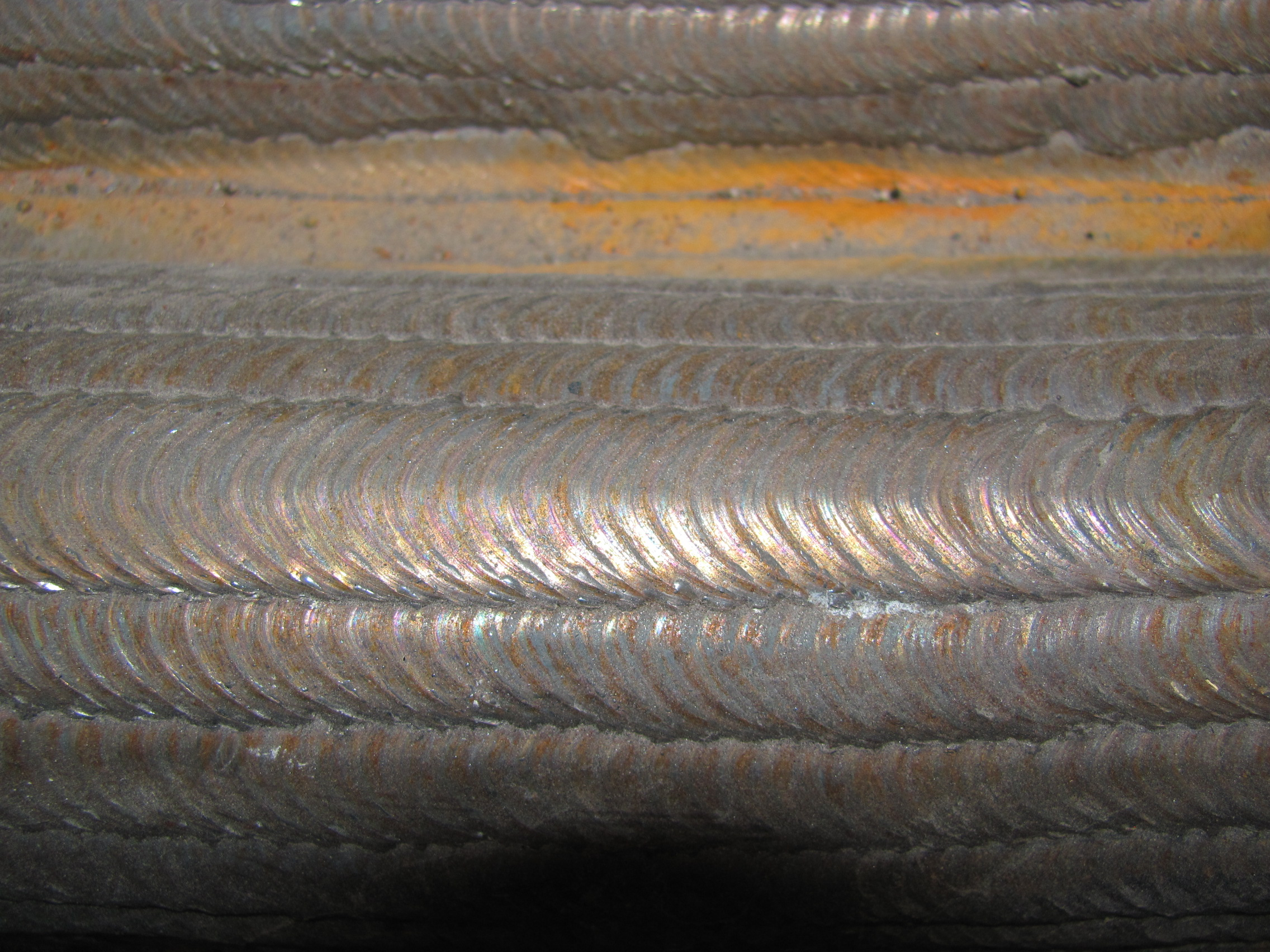 Cladding-Auftragsschweißung an einem Kesselrohr